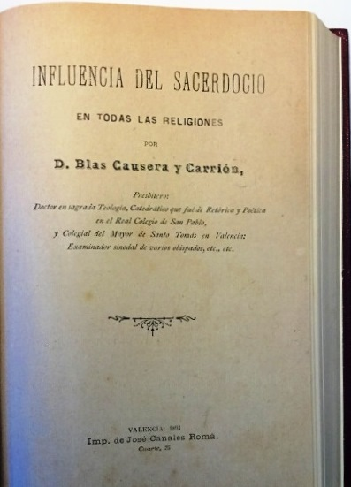 Causera: Influencia del sacerdocio Causera: Initial page of a religious work